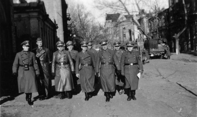 Fahrt von Kiew nach Charkow Einsatzstab RR in den Straßen von Charkow 6./12.November 1942 Film 42-39 Information added by Wikimedia users.